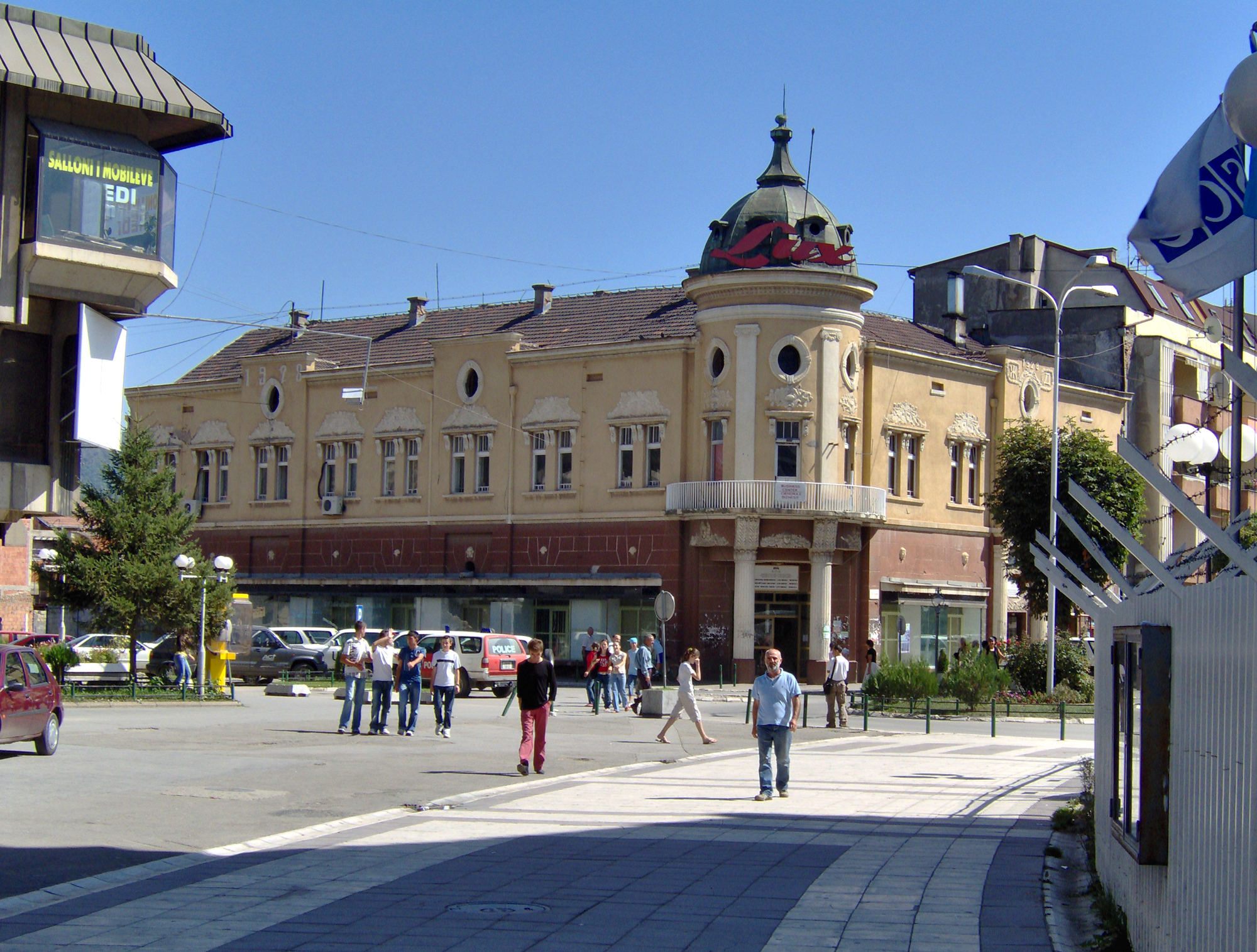 Madde açıklaması için örnek resim